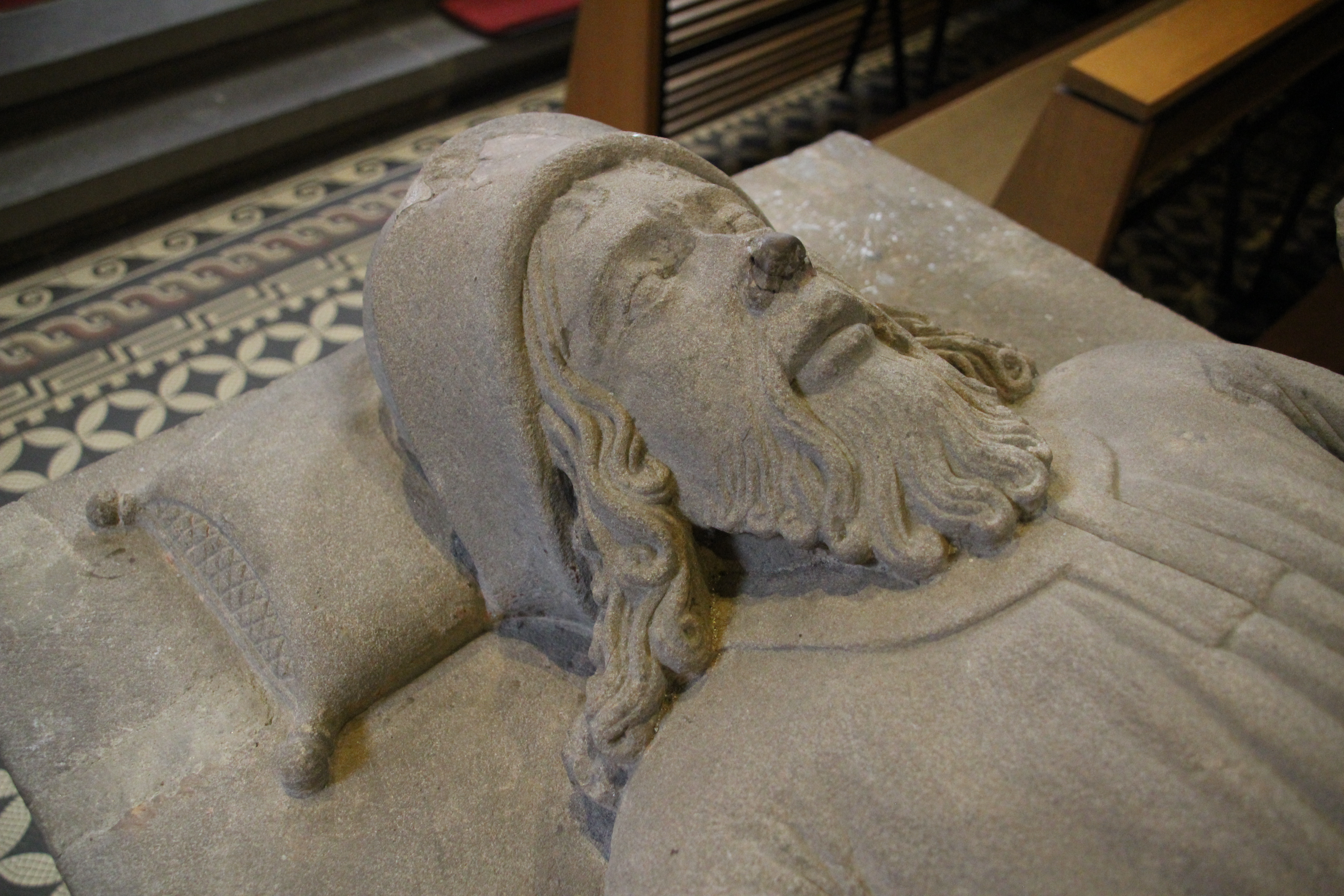 Hochgrab des hl. Arnold von Arnoldsweiler aus dem 15. Jahrhundert in der alten Pfarrkirche von Arnoldsweiler.